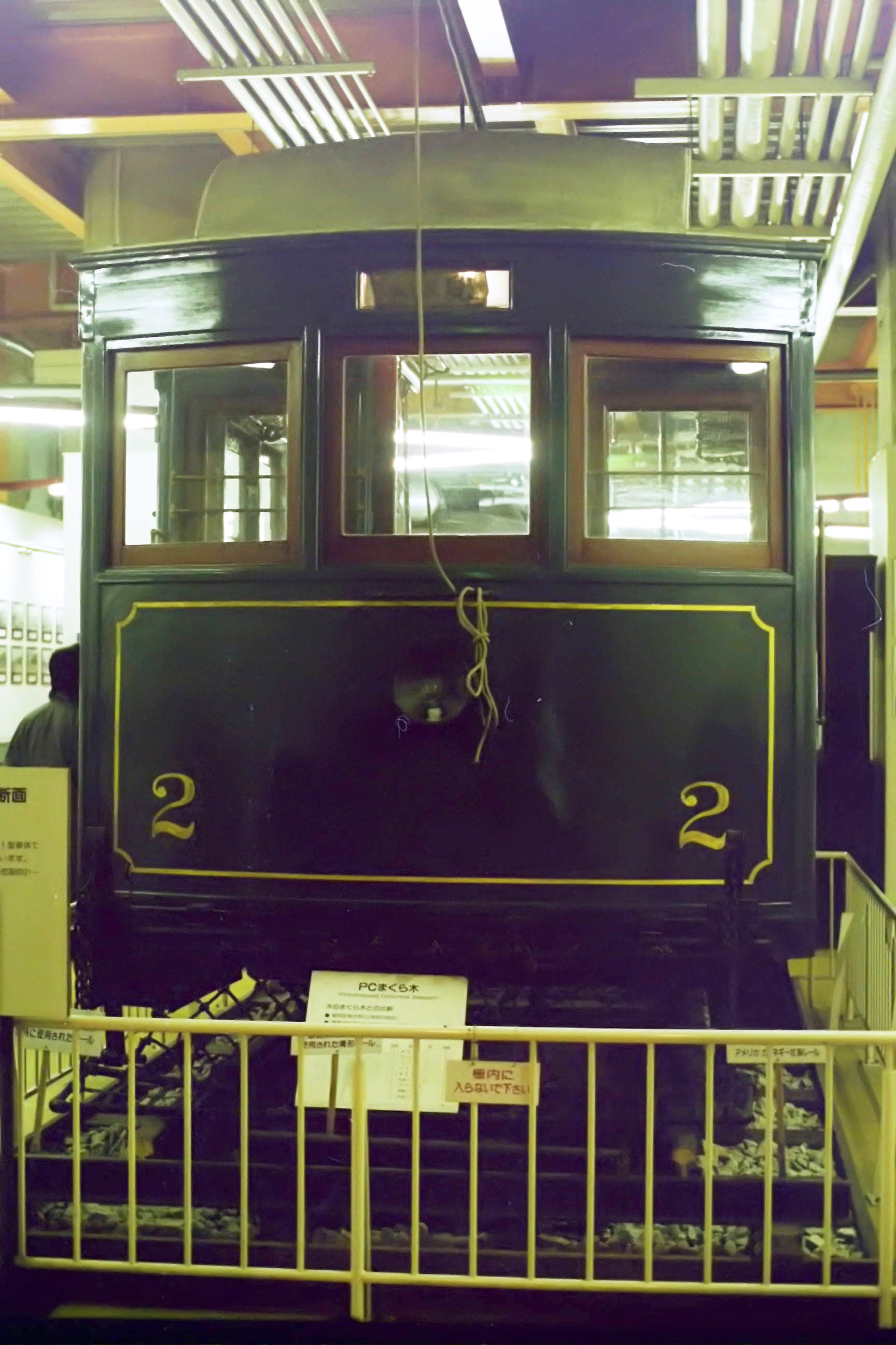 能勢電鉄 2